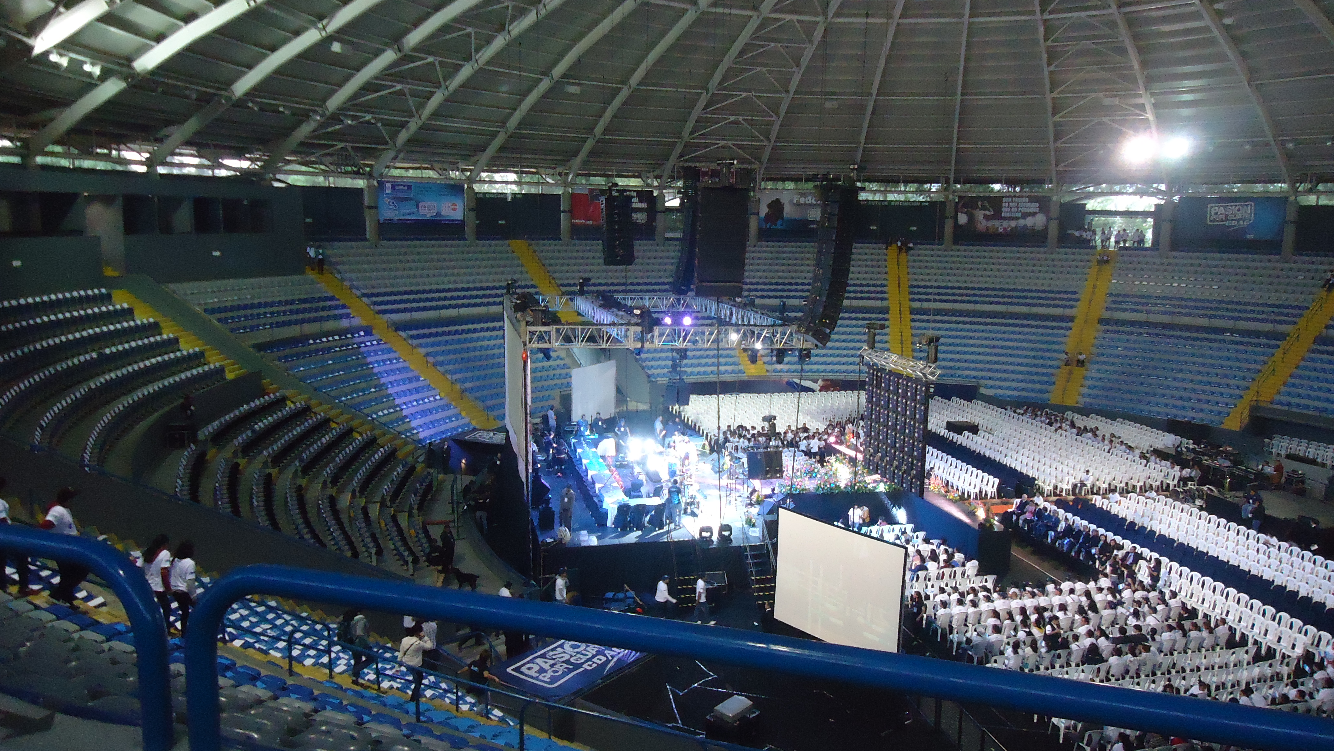 Vista del interior del Domo Polideportivo de la zona 13 de la Ciudad de Guatemala.